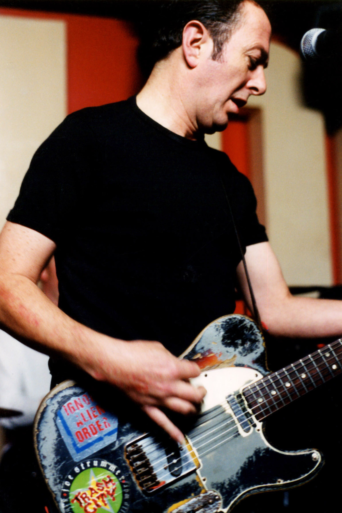 Joe Strummer